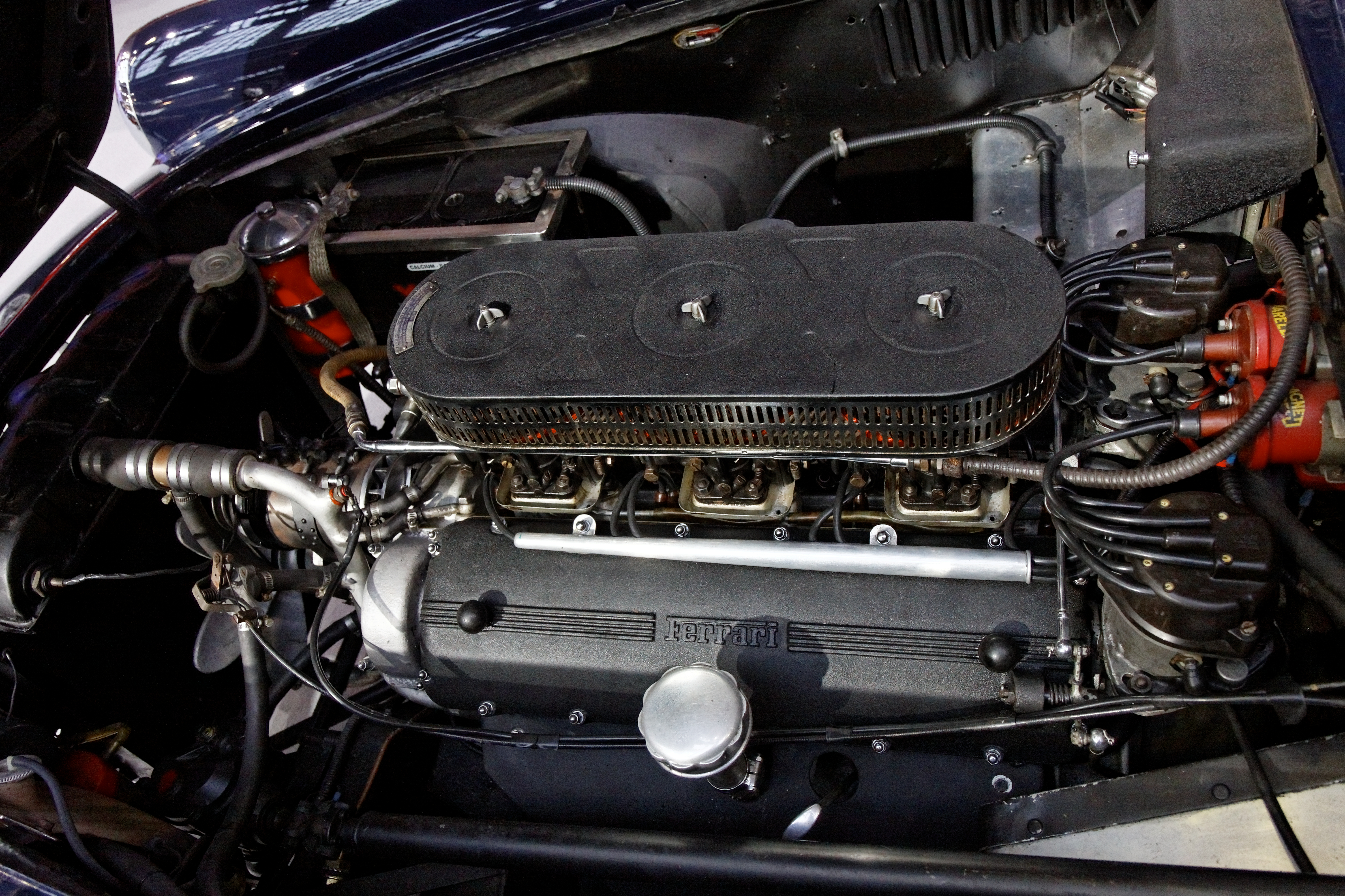 Ferrari 250GT Coupé